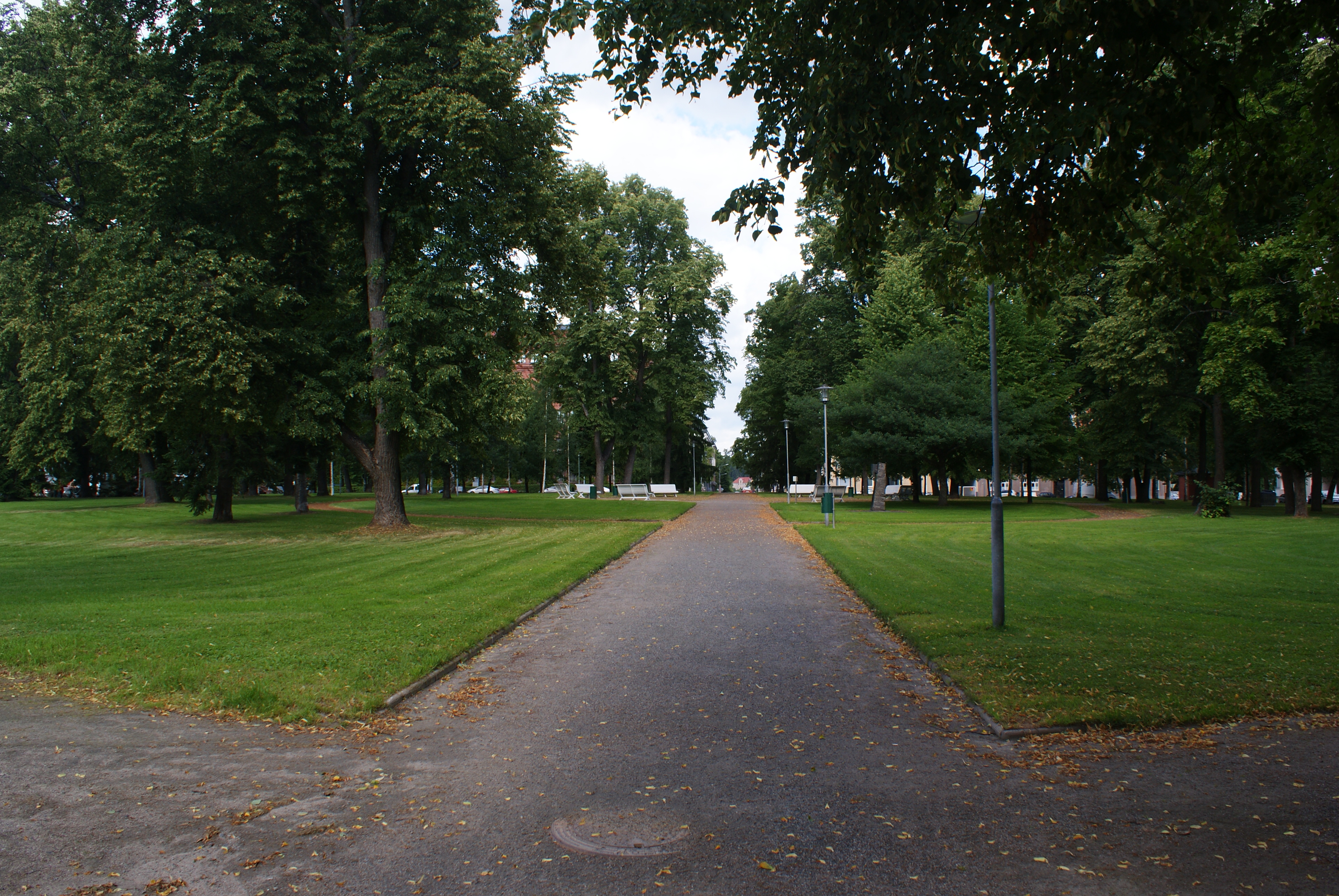 Piispanpuisto